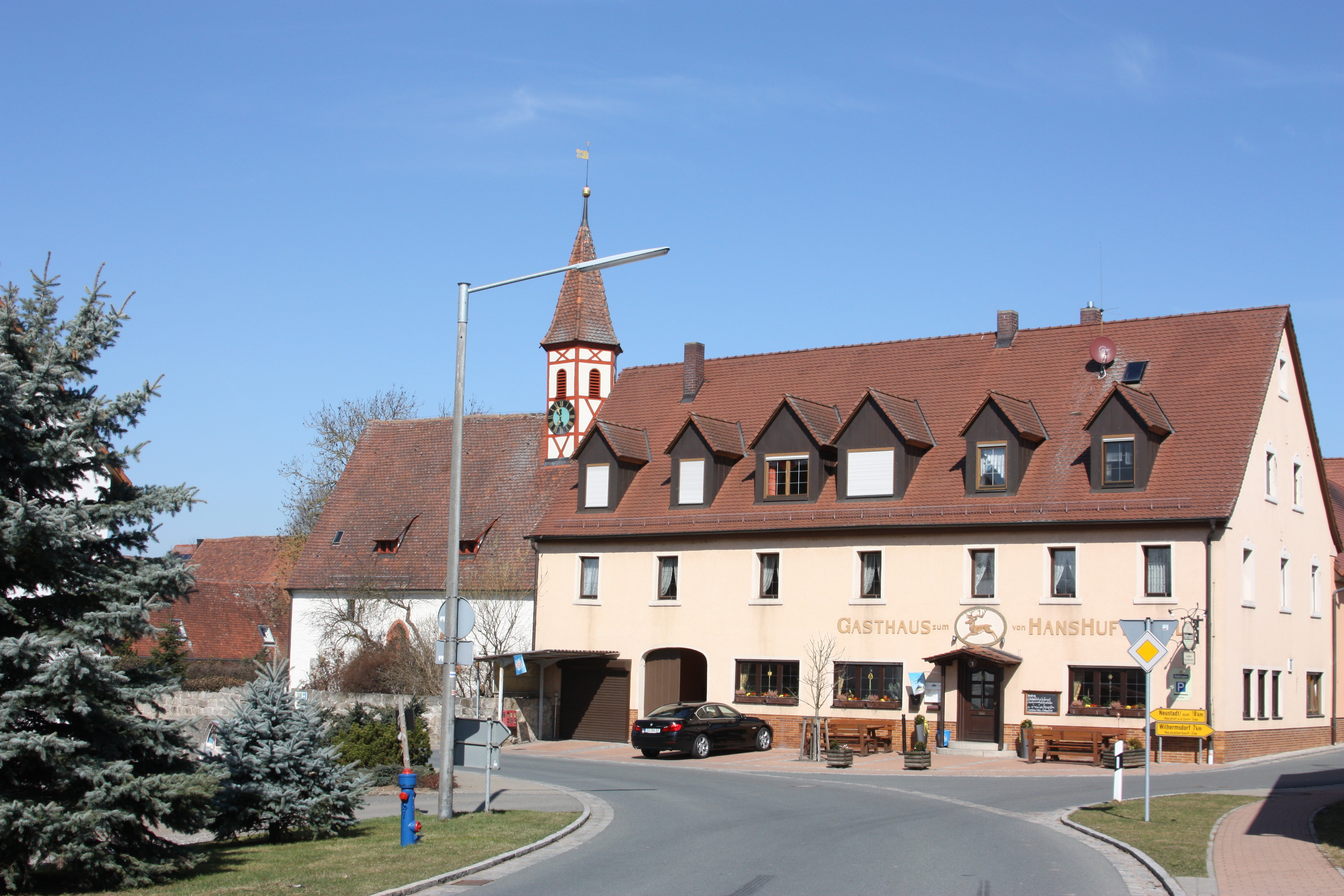 Neuhof OT Hirschneuses